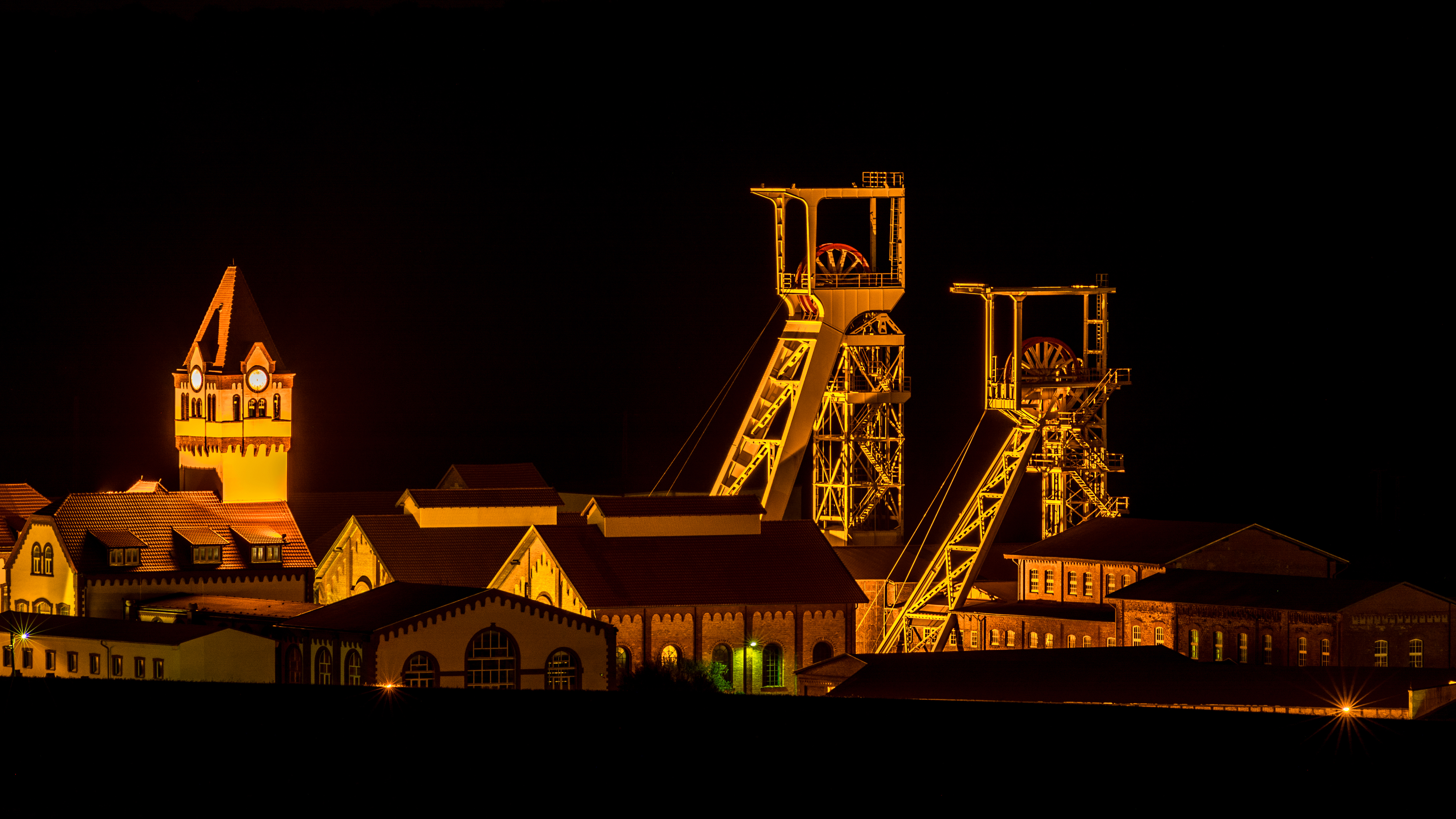 Bleicherorde, Kaliwerk